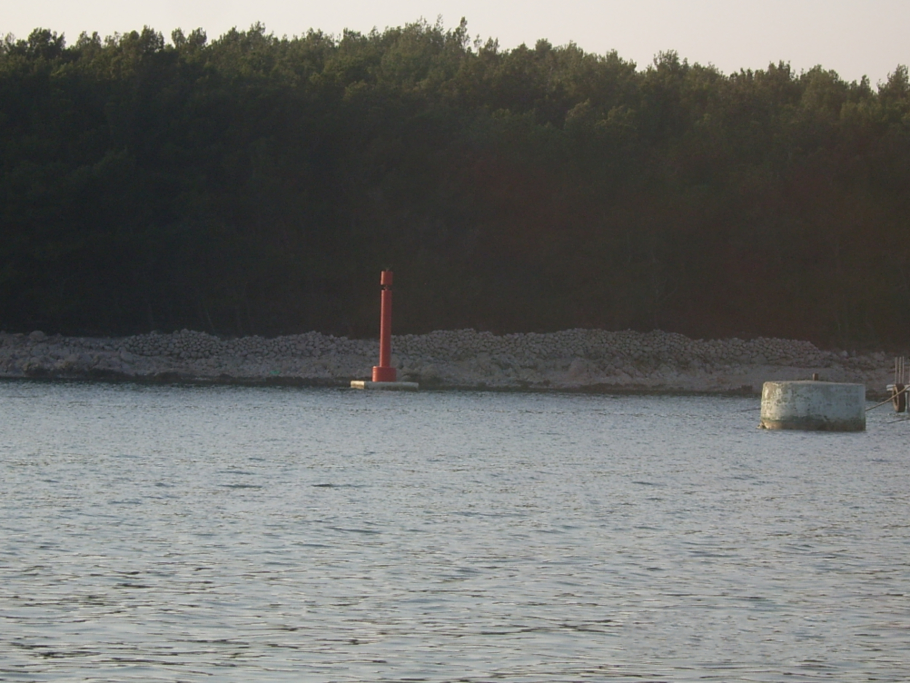 "Baba" i "Deda", po mnogim Puntarima ostaci stupova nosača nekadašnjeg mosta između Pile i poluotoka Prnibe tj. Punta i Krka